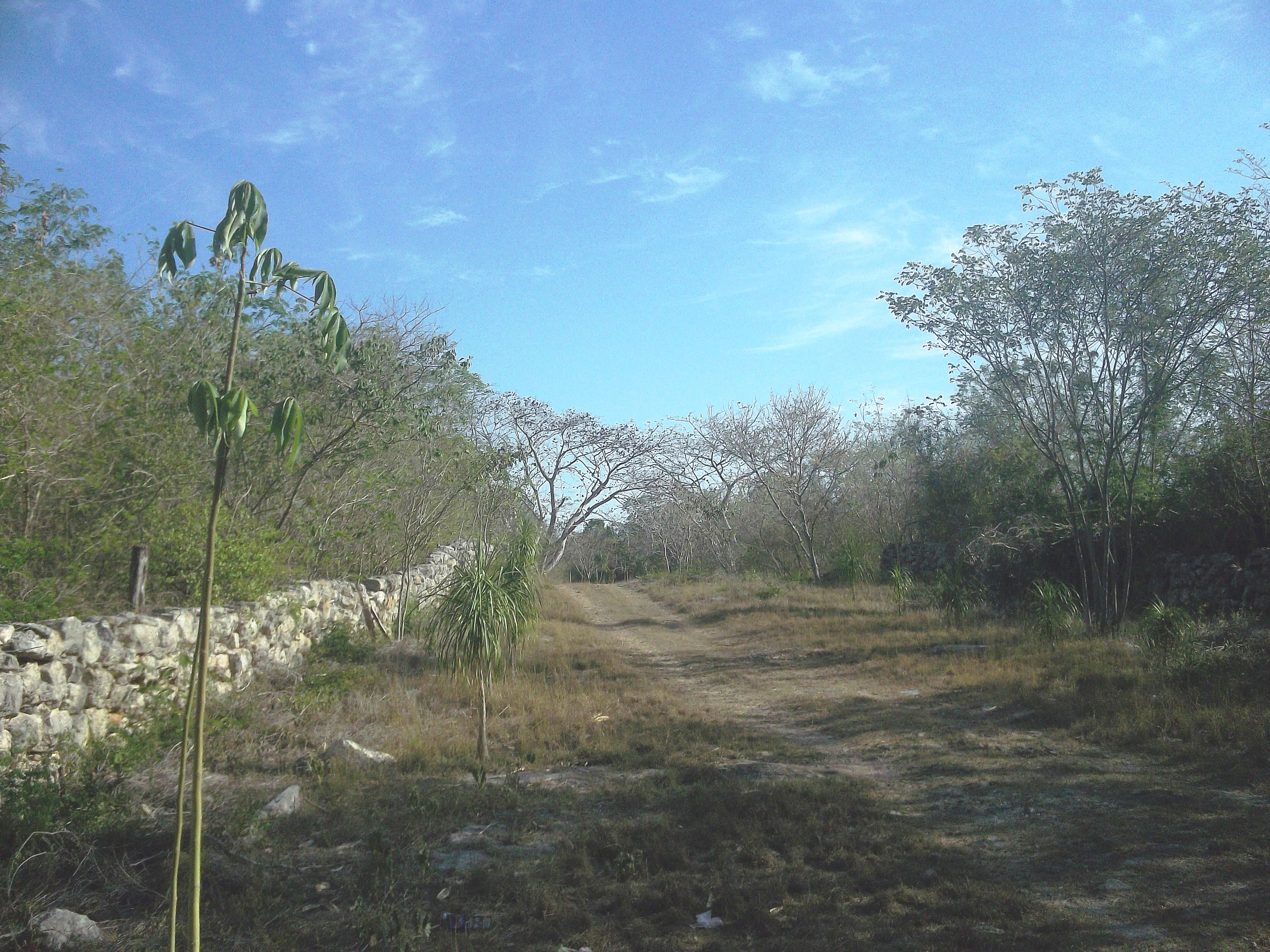 Vista de Mucuyché Campos, Yucatán.